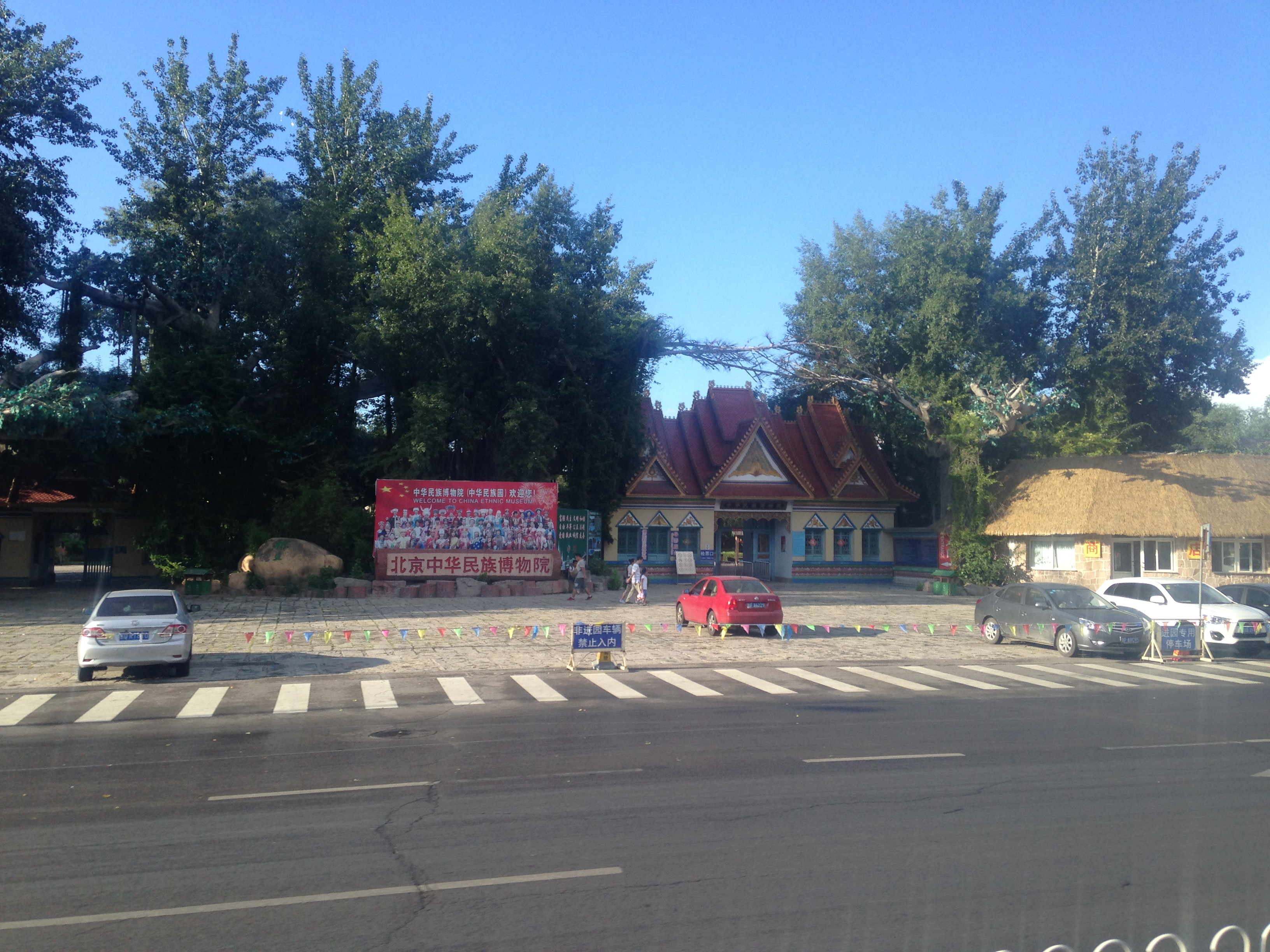 北京中華民族博物院